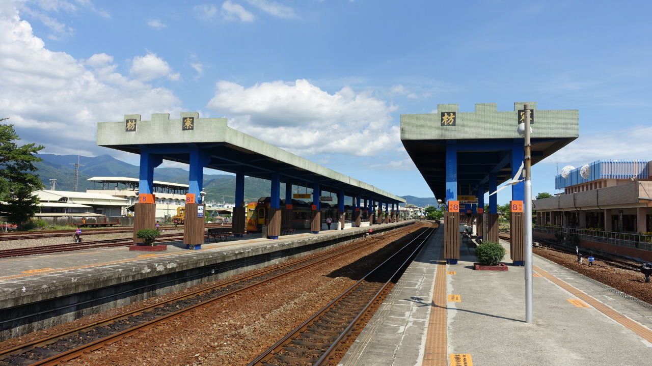 曾之喬(胡映月)與施易男(康邵祺)送別的月台